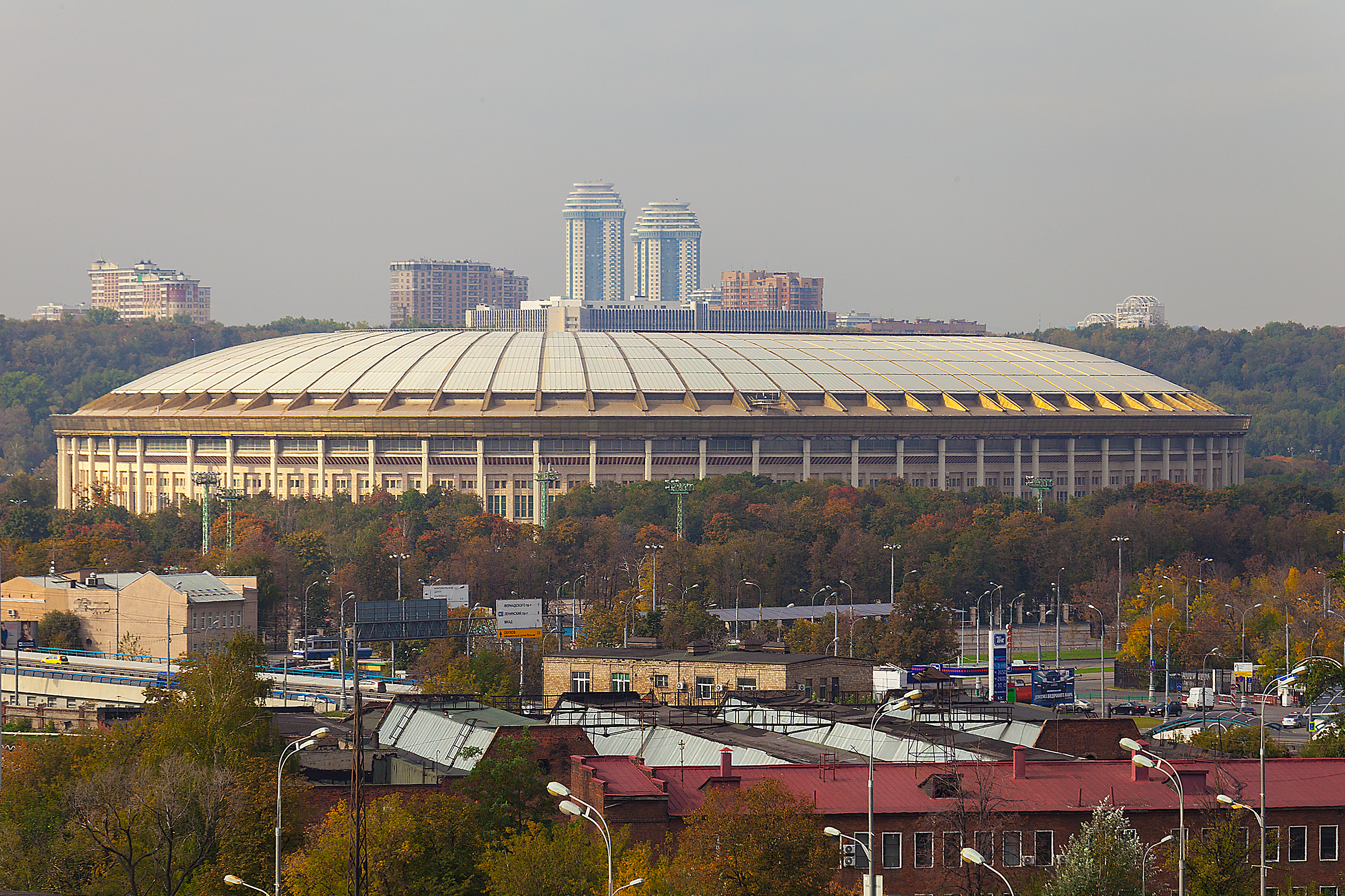 Лужники